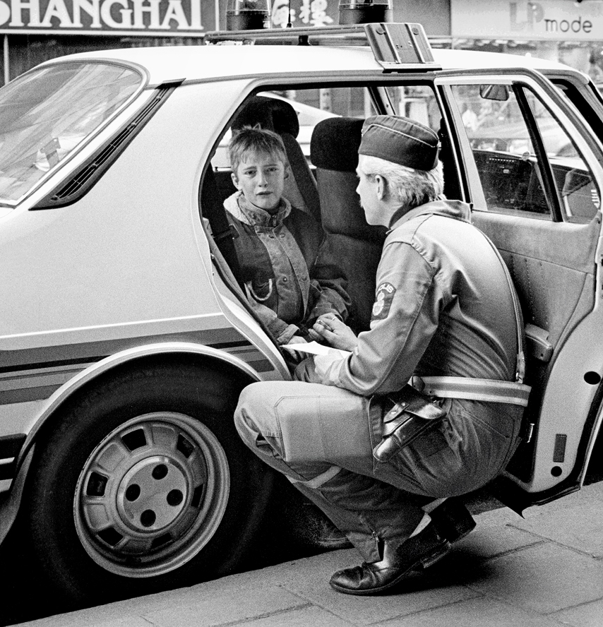 En polis tröstar en gråtande pojke som blev lätt påkörd av en bil när han körde skateboard över en gata i centrala Malmö 1986.